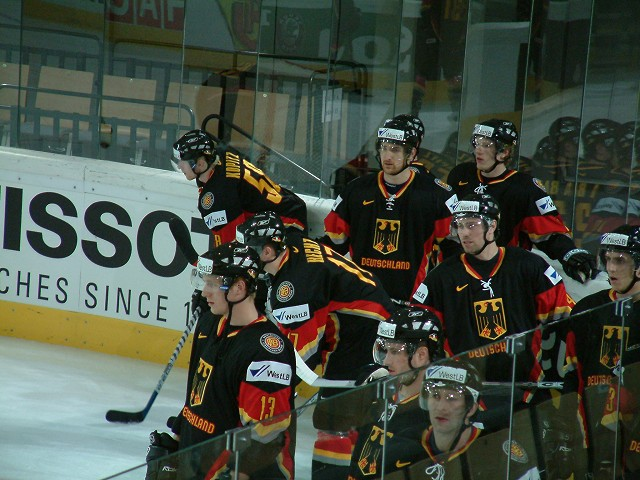 Spieler der deutschen Nationalmannschaft bei der WM in Wien